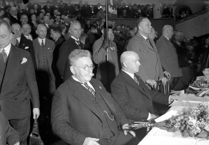 Die grosse Versammlung der Deutschnationalen zur Präsidentenwahl im Sportpalast in Berlin ! Oberstleutnant Duesterberg, der zweite Vorsitzende des Stahlhelmbundes (rechts), der Präsidentschaftskandidat der Deutschnationalen und des Stahlhelms mit dem Vorsitzenden der Deutschen Volkspartei Geheimrat Hugenberg während der ersten Wahlversammlung.